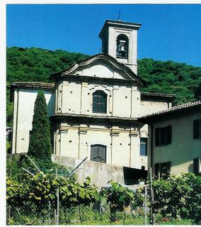 Facciata della Chiesa Parrocchiale di San Bartolomeo